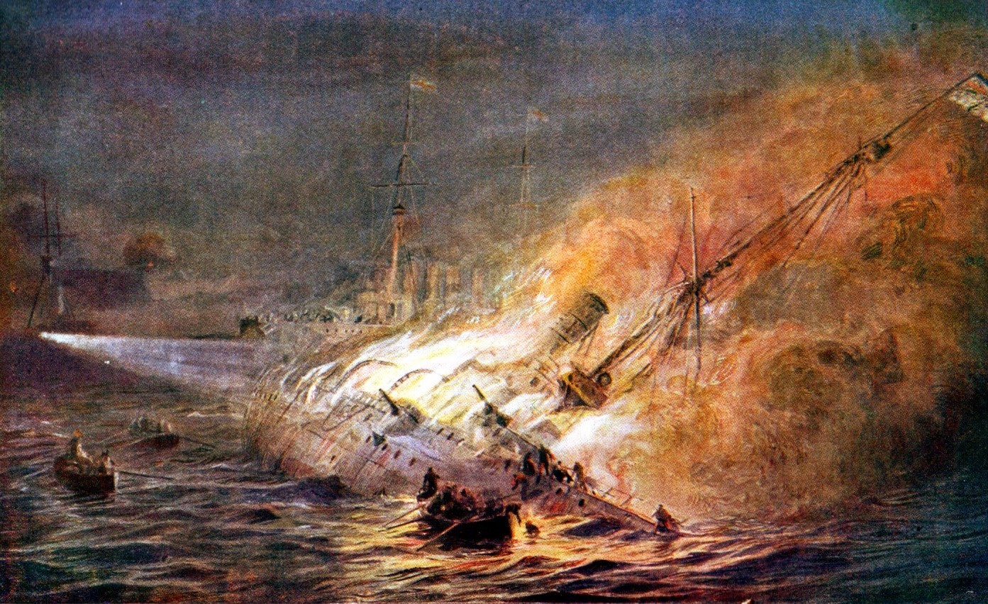 Le croiseur léger allemand SMS Leipzig coulant lors de la bataille des Falkland, le 8 décembre 1914.